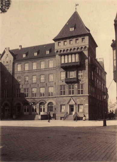 Studentersamfundet, Bispetorv